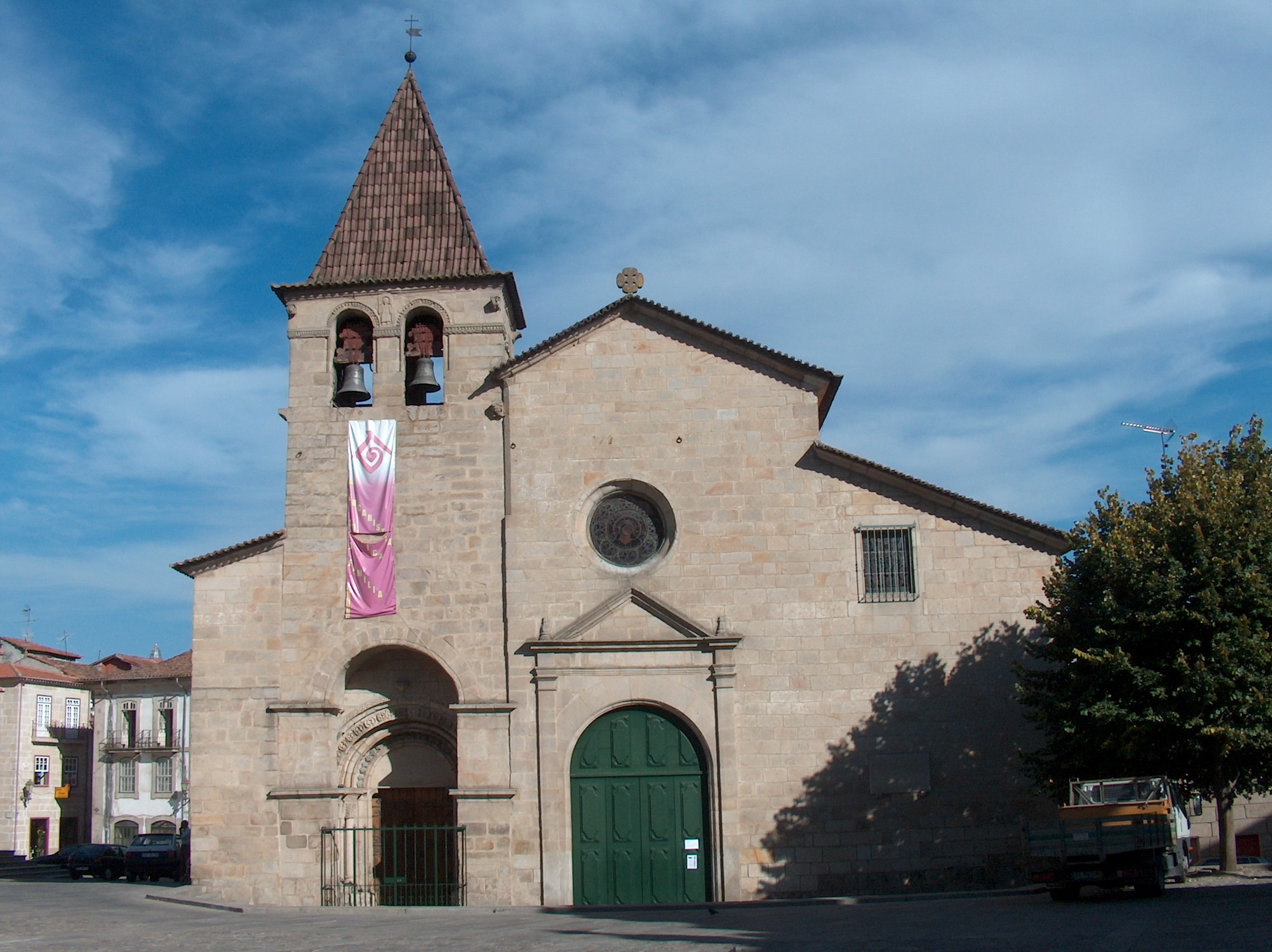 Igreja de Santa Maria Maior ou Igreja Matriz de Chaves